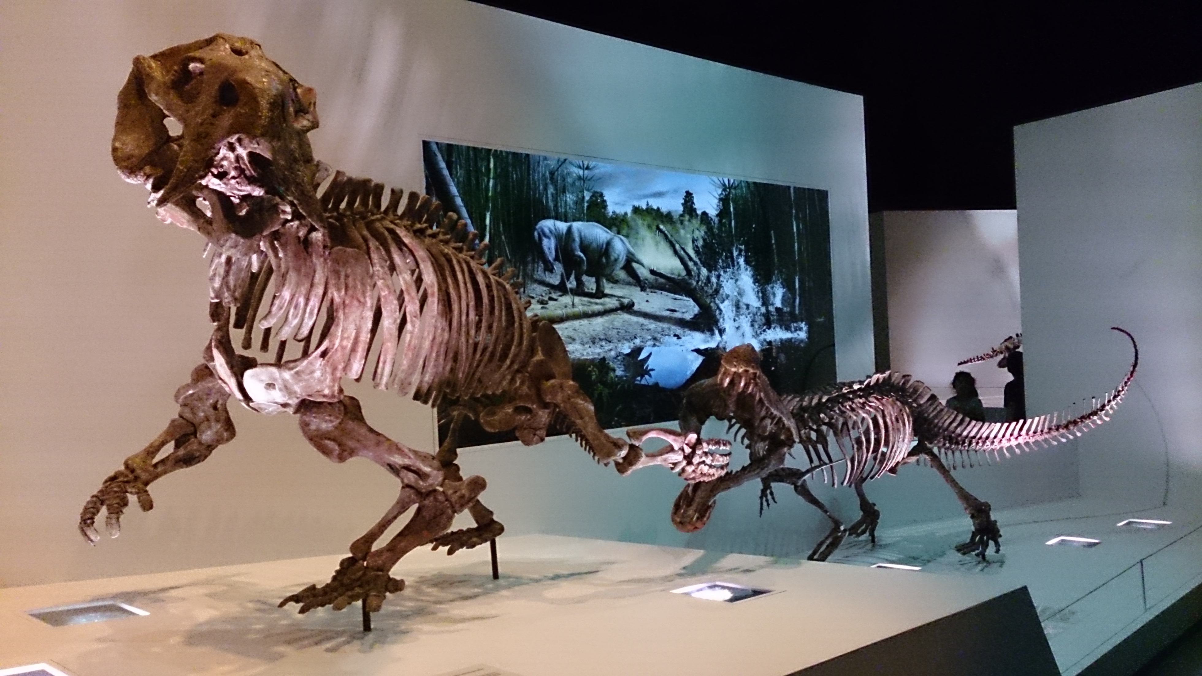 Paleo Hall at HMNS